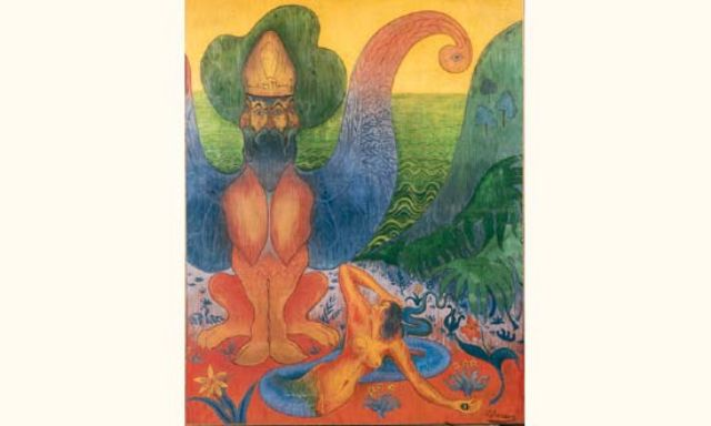 huile sur toile 1891 de Paul-Elie Ranson 92x73 cm